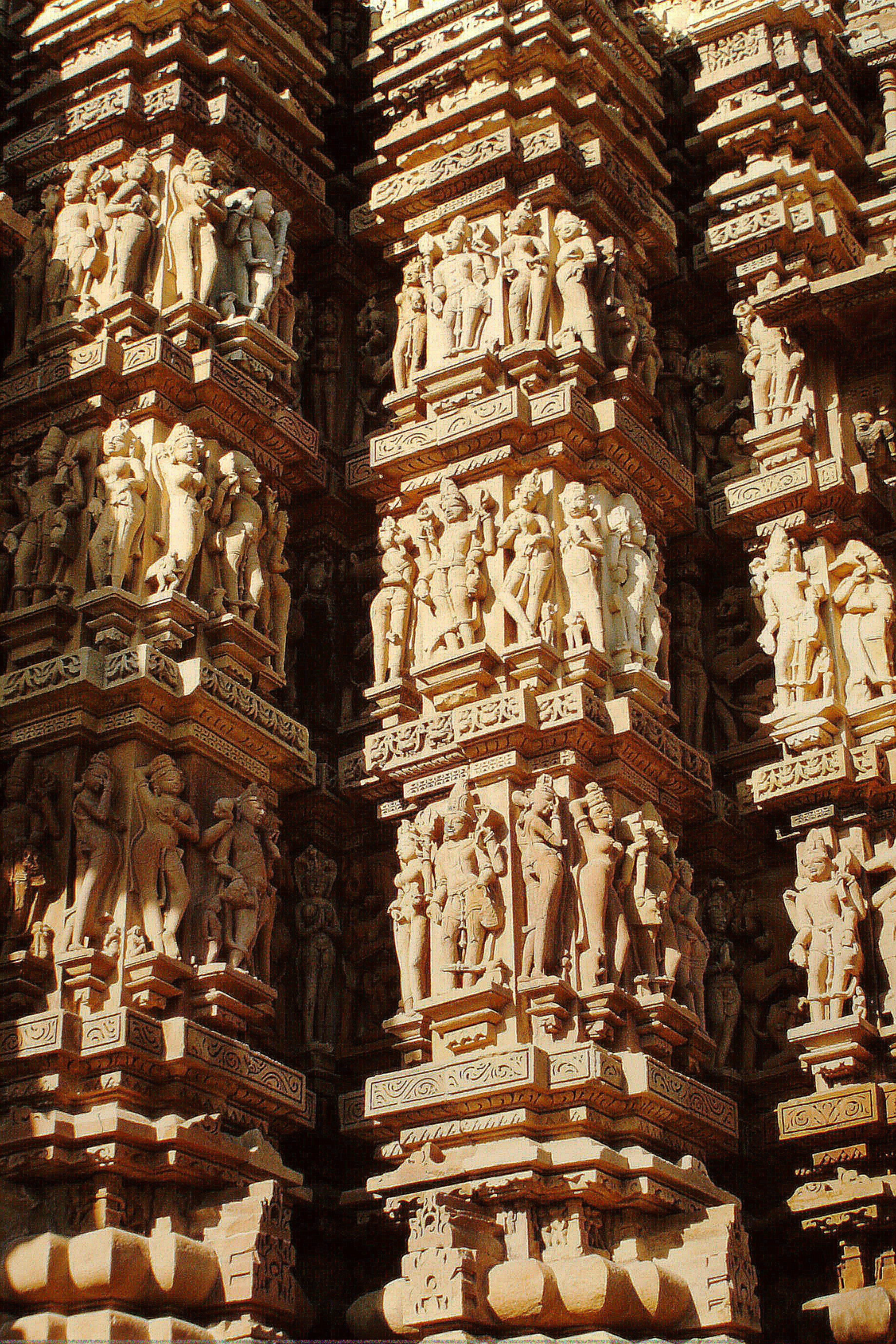 Khajuraho, Kandariya-Mahadeva-Tempel, Detail